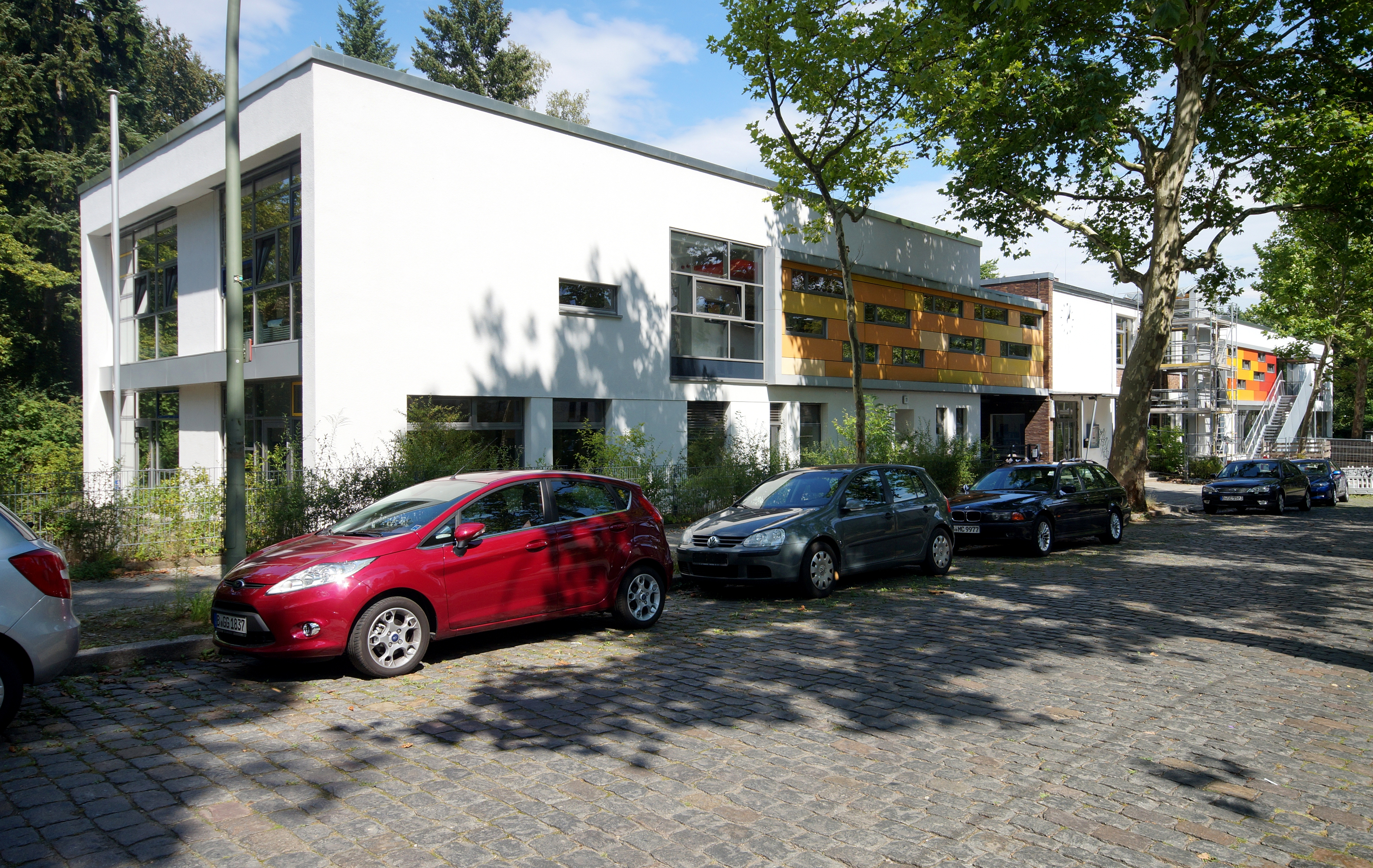 Die Grundschule am Insulaner im Bezirk Steglitz-Zehlendorf in Berlin